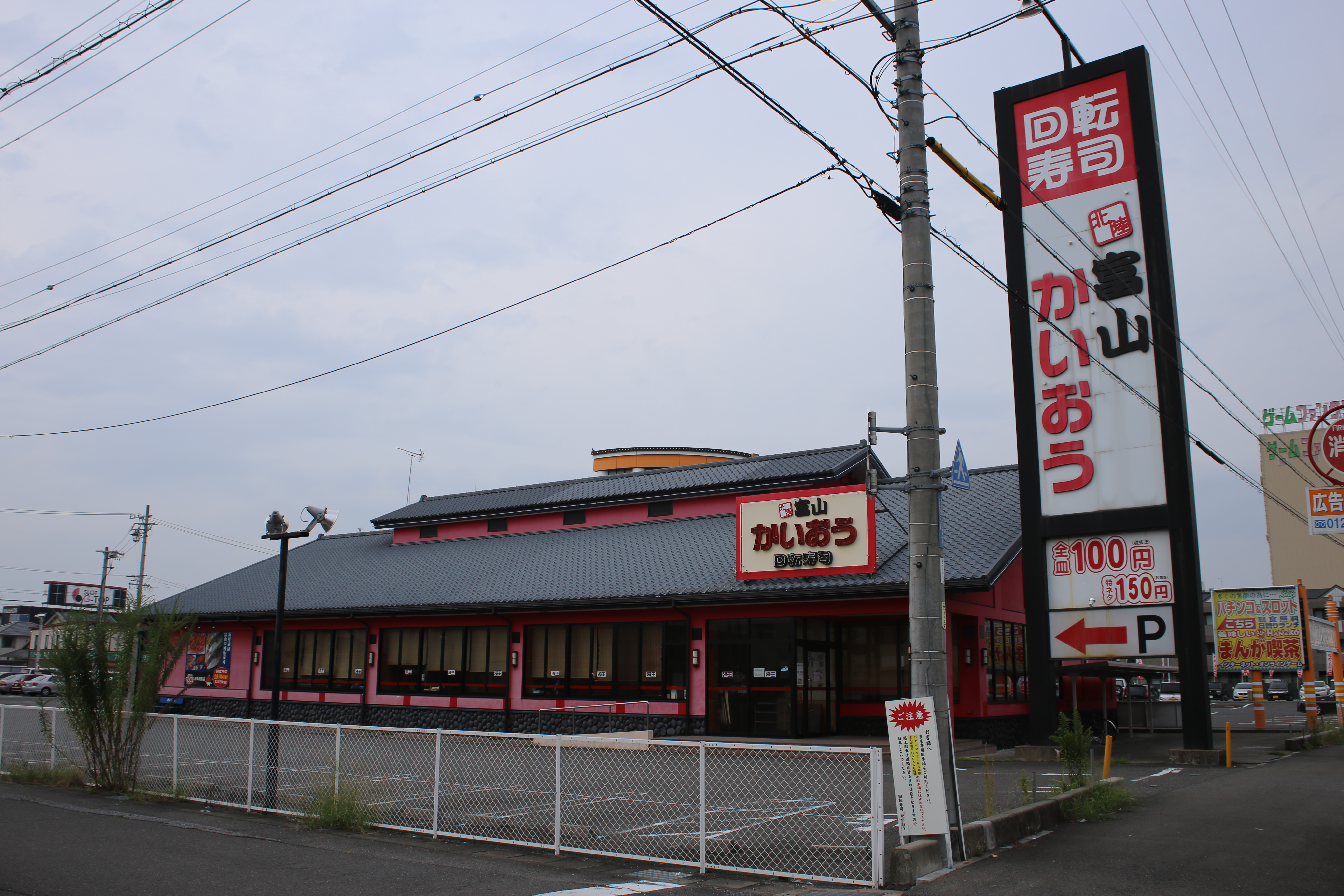 岐阜県岐阜市鏡島精華の「北陸富山回転寿司かいおう岐阜鏡島店」を東側公道南側より撮影